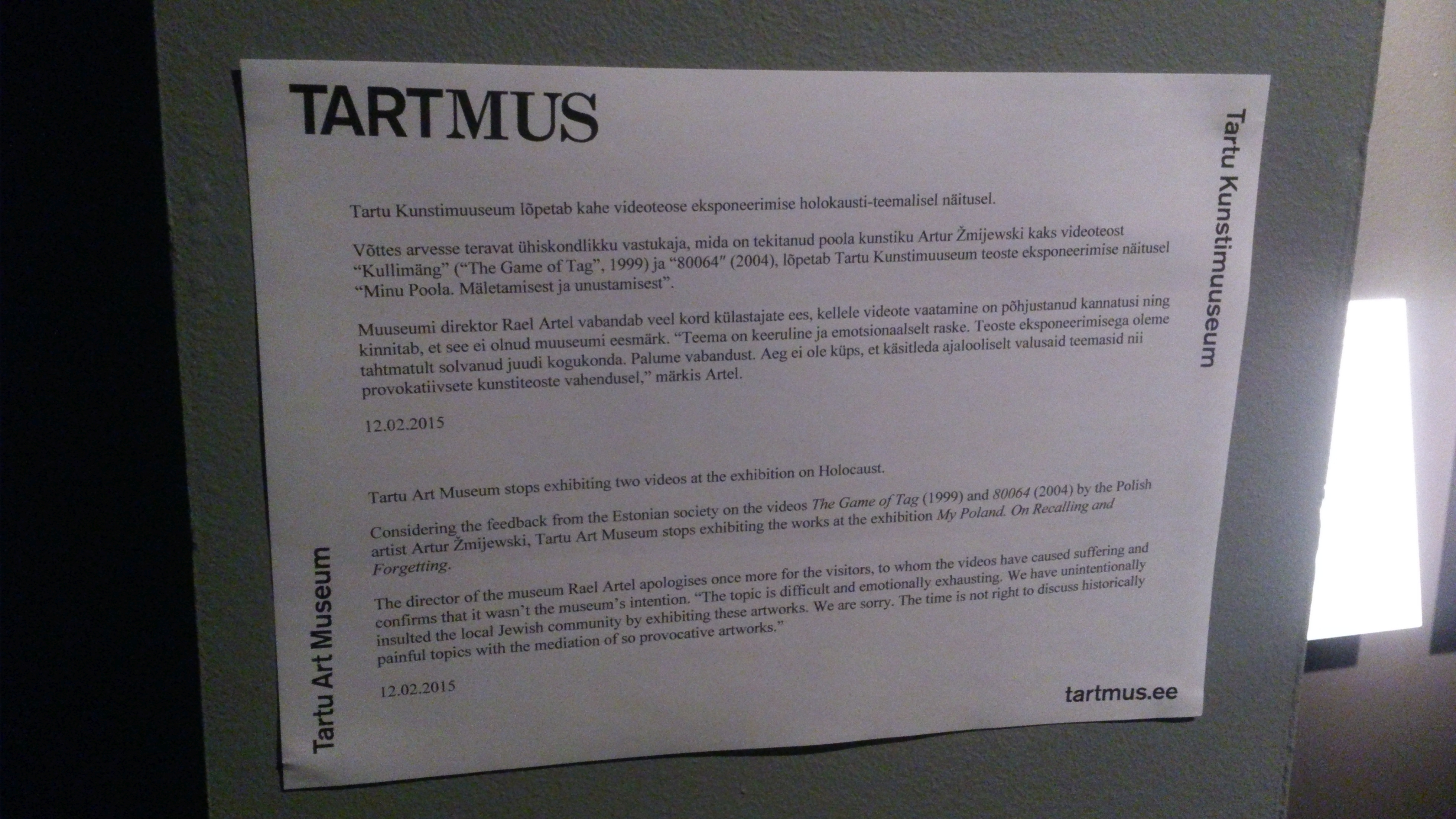 Teade kahe video eemaldamisest Tartu Kunstimuuseumi näituselt "Minu Poola" toas, kus varem eksponeeriti Artur Zmijewski videosid.